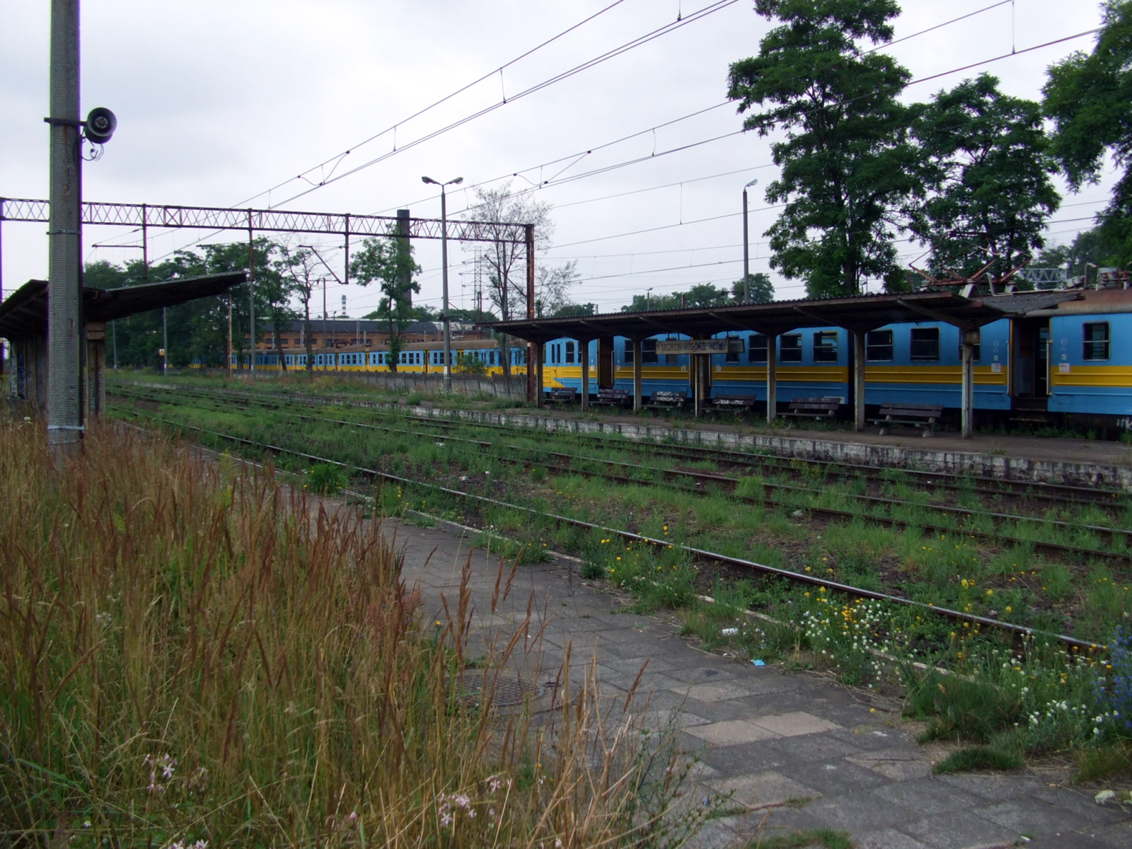 Stacja kolejowa Szczecin Wzgórze Hetmańskie